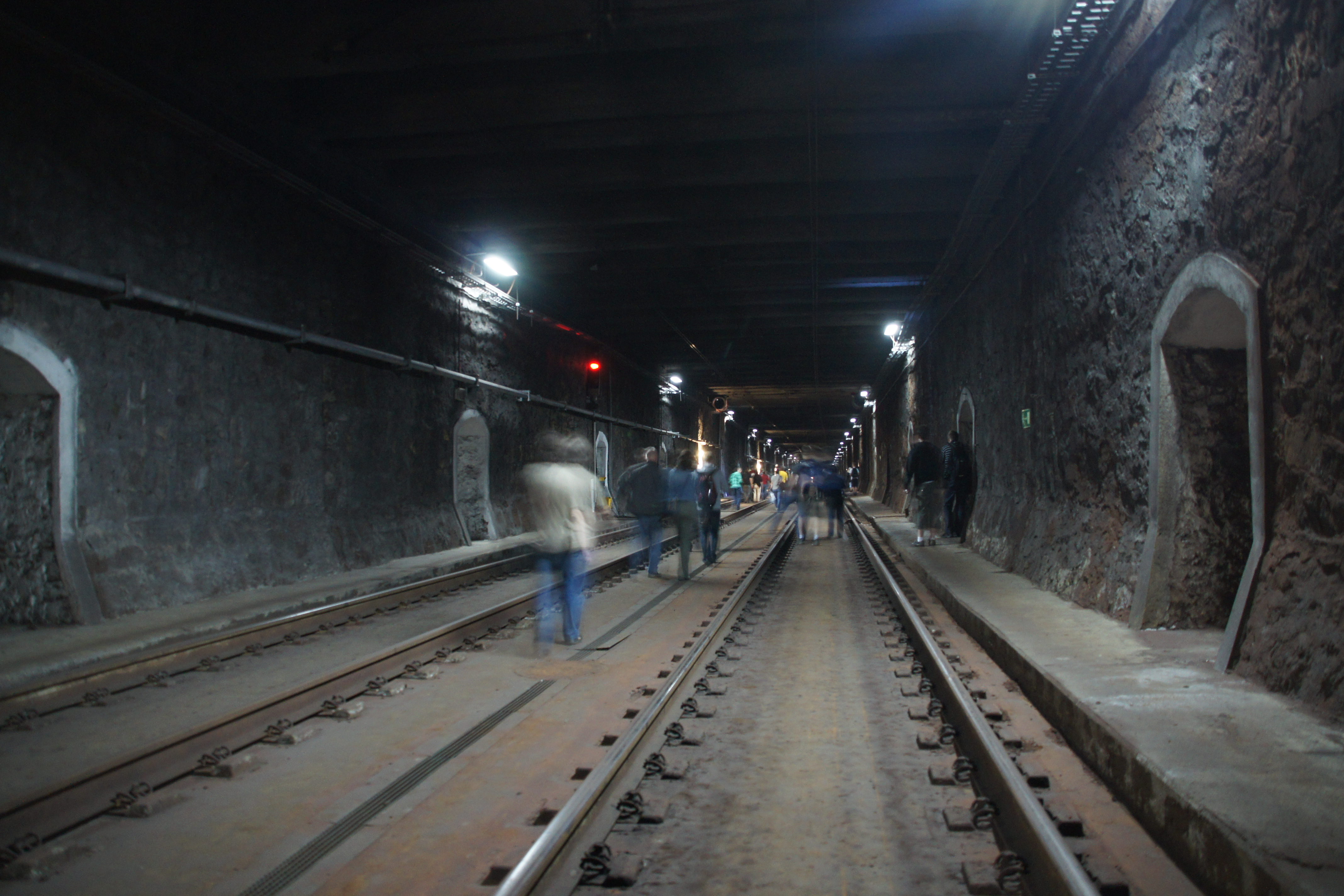 Tunel średnicowy w Warszawie - część dla pociągów podmiejskich